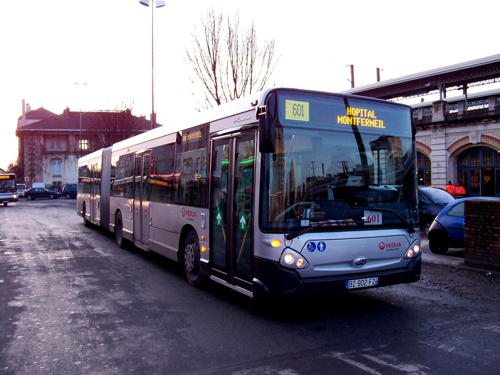 GX 427 Artictulé